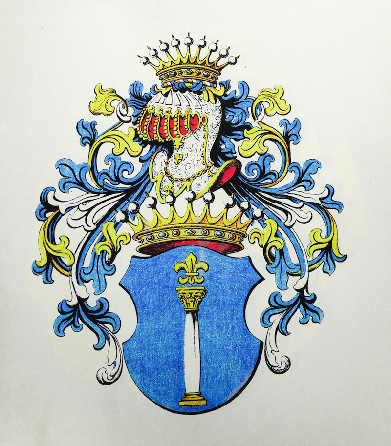 Arma della casata